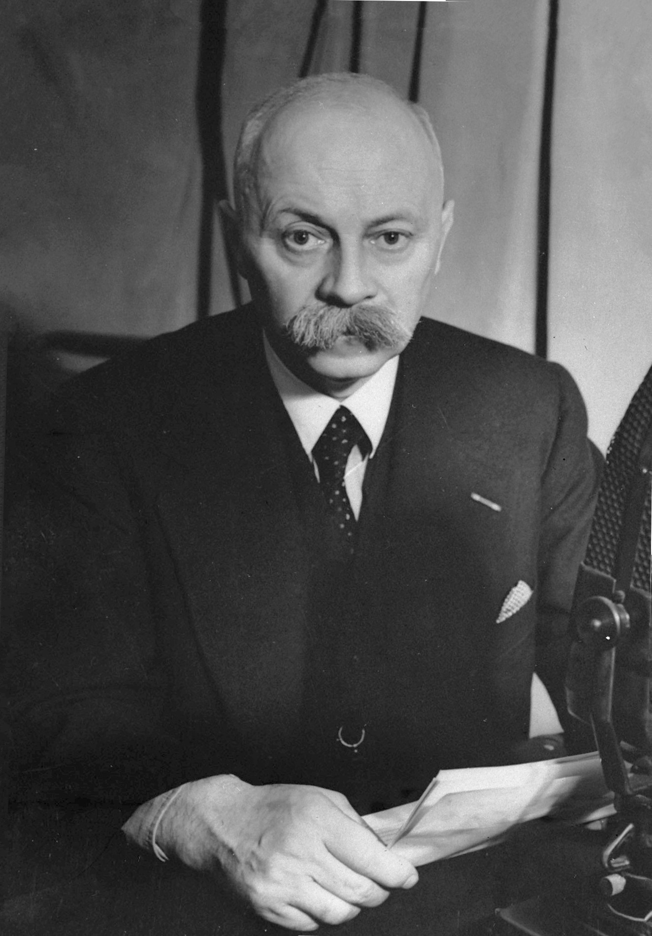 Prof. P.S. Gerbrandy, minister-president, in de studio van de BBC voor de eerste van een serie toespraken gericht op Zuid-Afrika